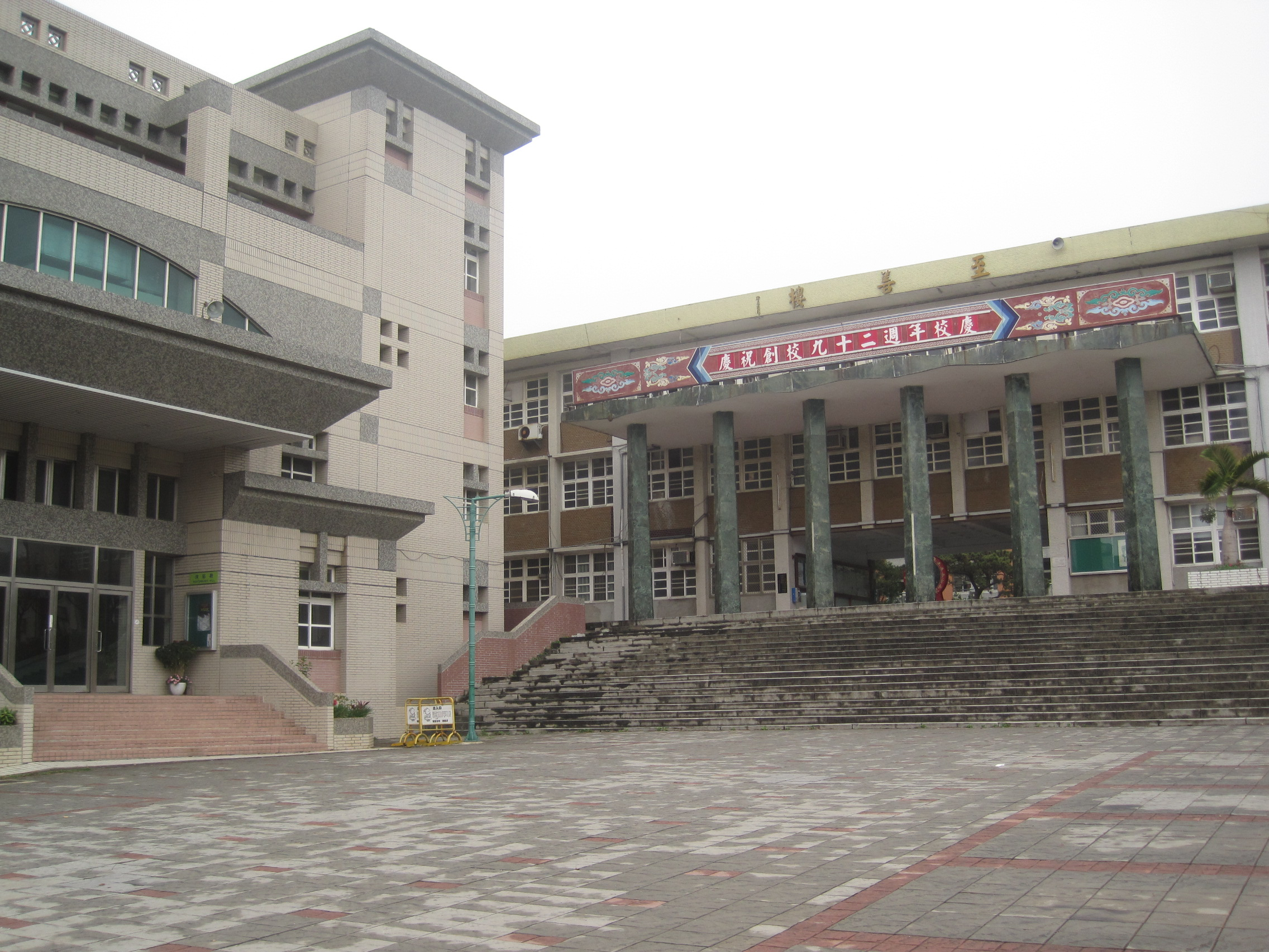 新竹高中至善樓，圖片左側是音樂館